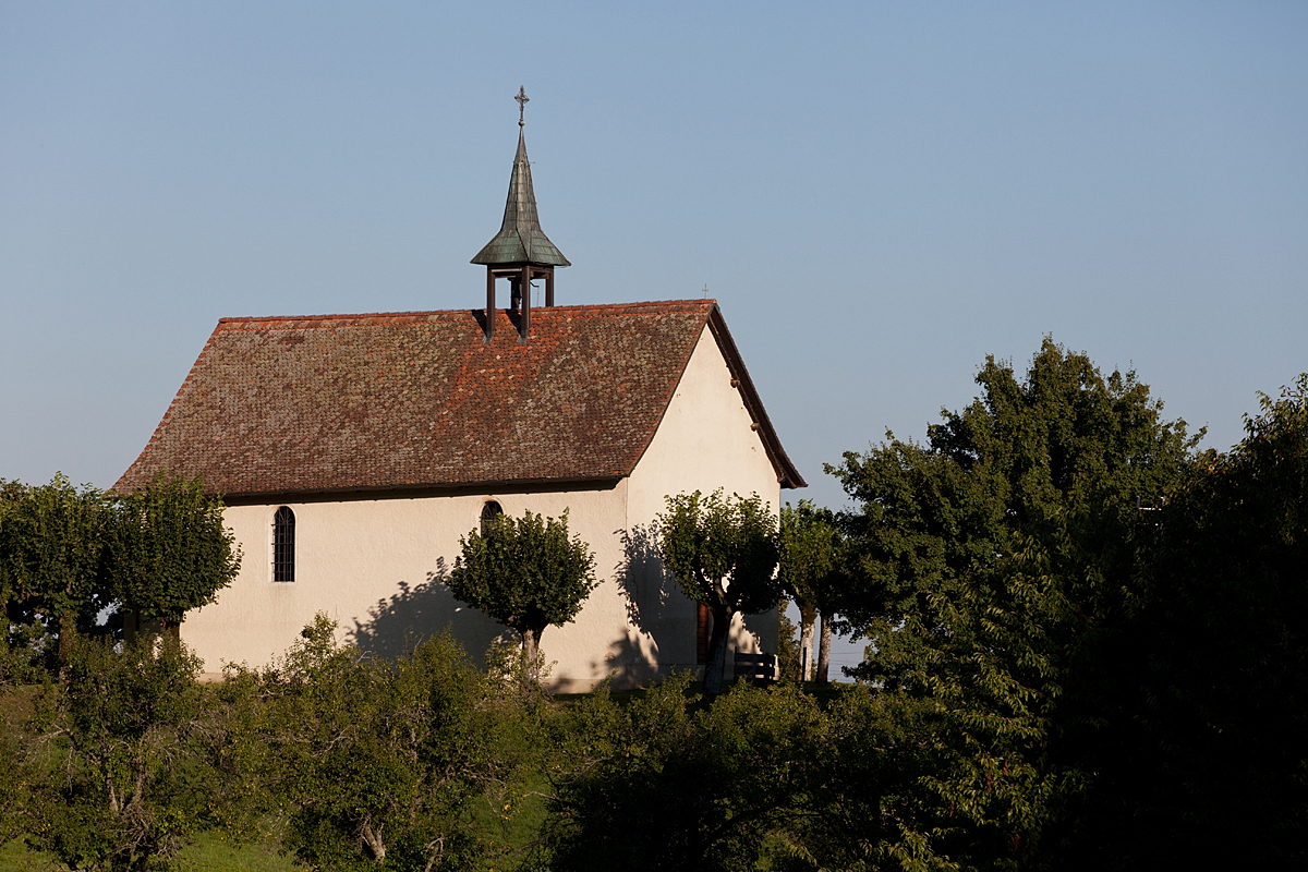 Chapelle Saint-Gilles à Cornol (JU)